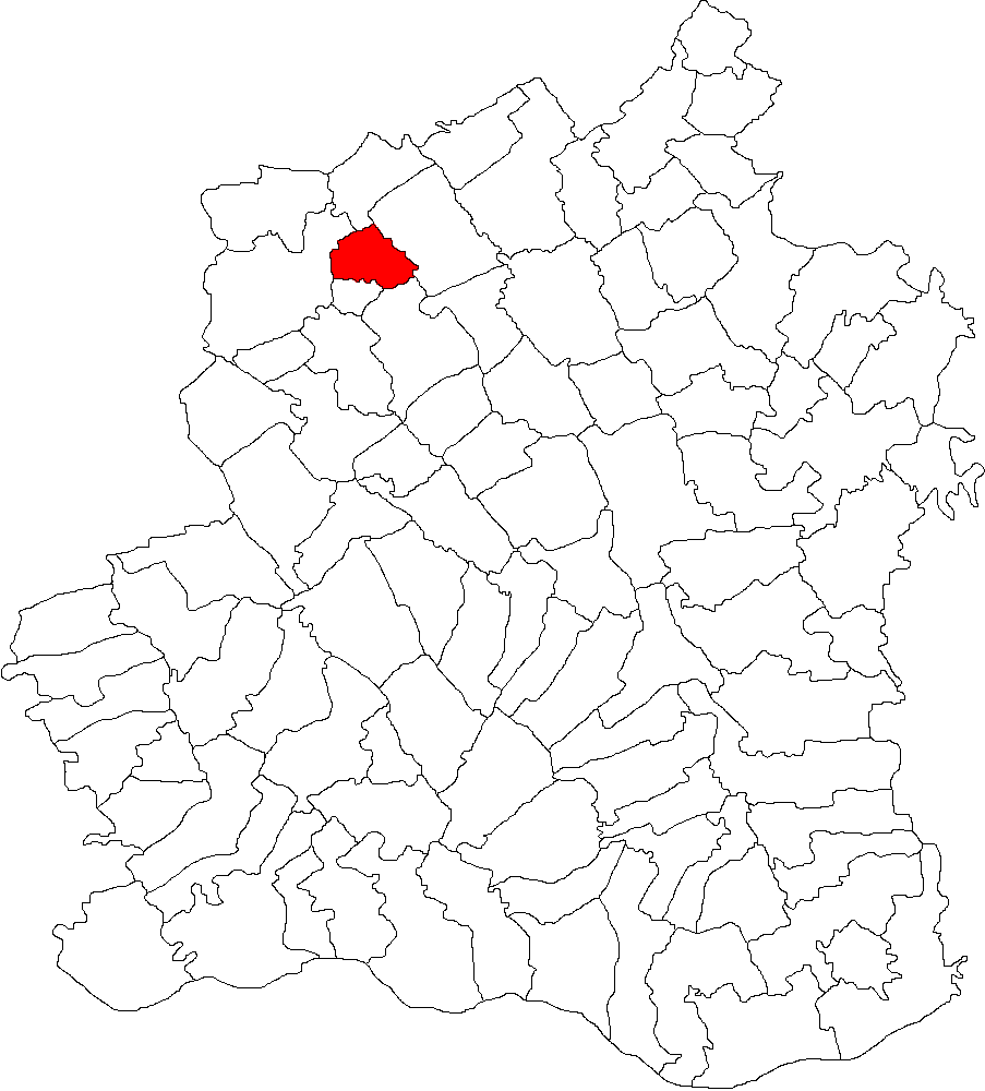 Categorie:Hărţi ale judeţului Teleorman